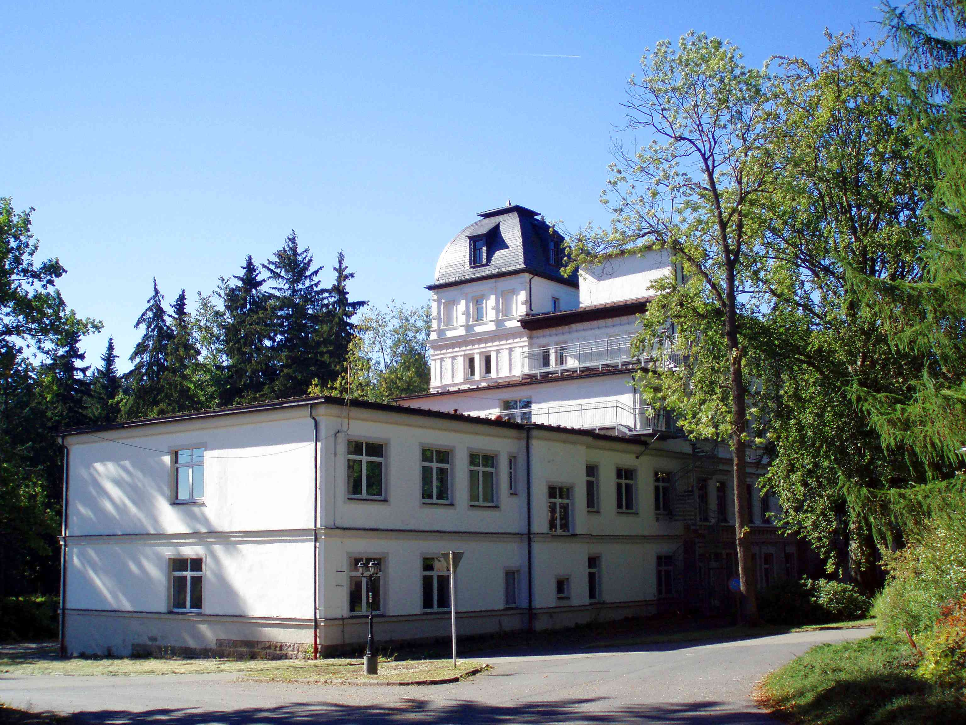 Bad Reiboldsgrün